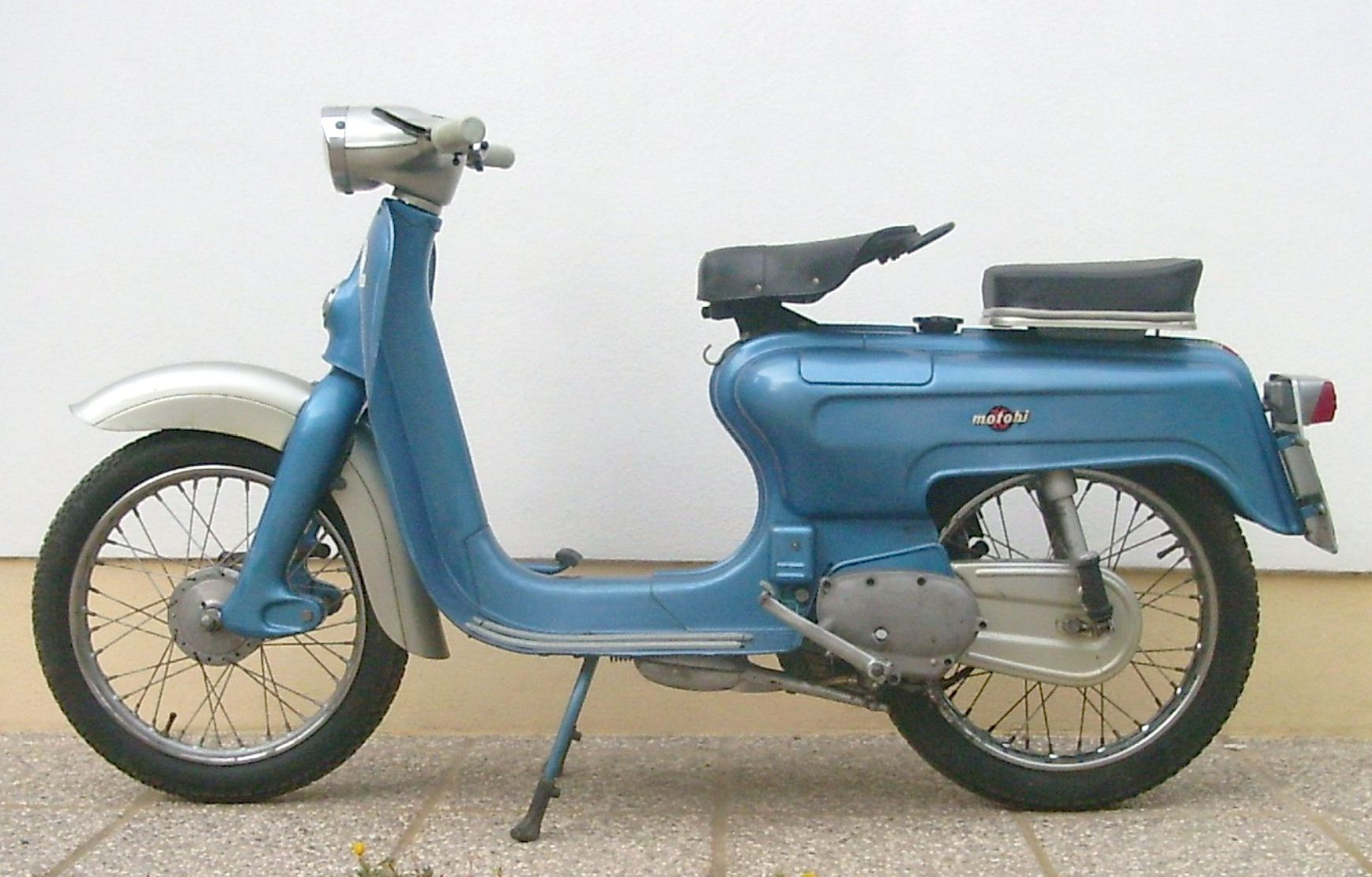 Foto di uno scooter Picnic della Motobi vensione da 75cc del 1961.